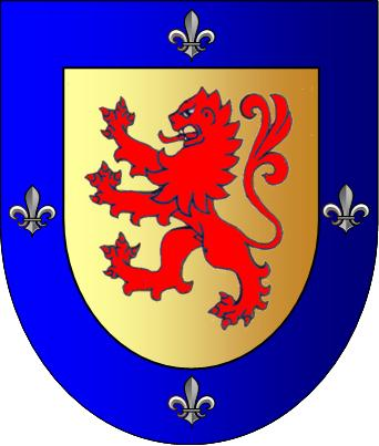 Blasón de armas: De oro, un león rampante de gules, bordeado de azur y encargado de cuatro flores de lis de oro. Cimbre: Tres plumas de avestruz. Divisa: Osar morir, da la vida. hay una version mas correcta del escudo pues faltan las tres plumas de avestruz, aquí un enlace al escudo más original[1]